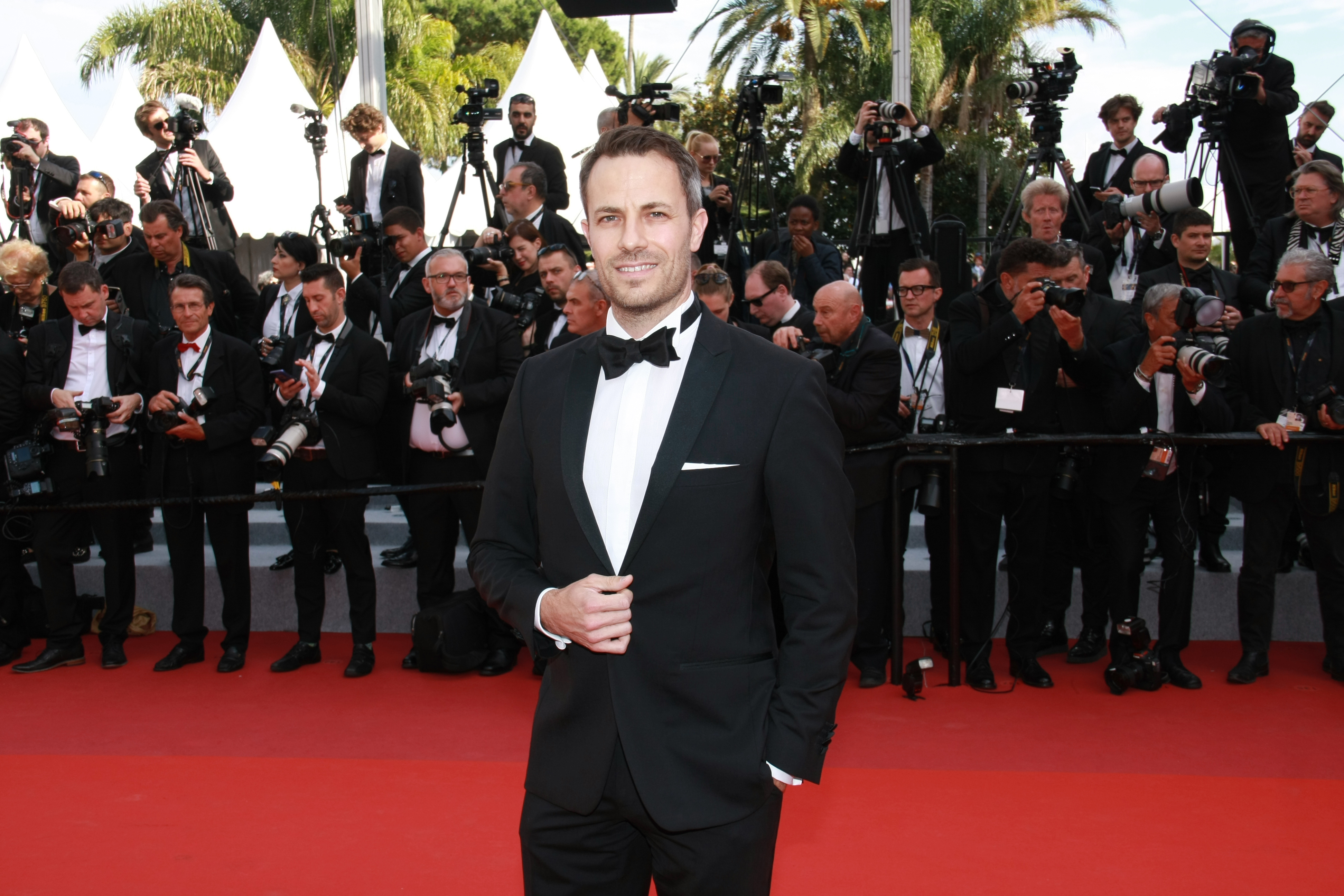 Severino Negri auf dem roten Teppich an den Filmfestspielen in Cannes 2019